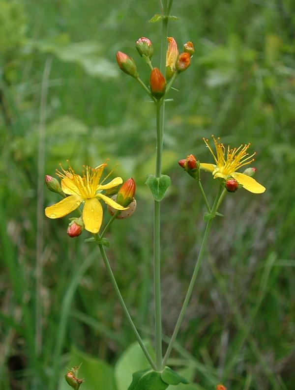 Millepertuis élégant Hypericum pulchrum, Bucey-lès-Gy